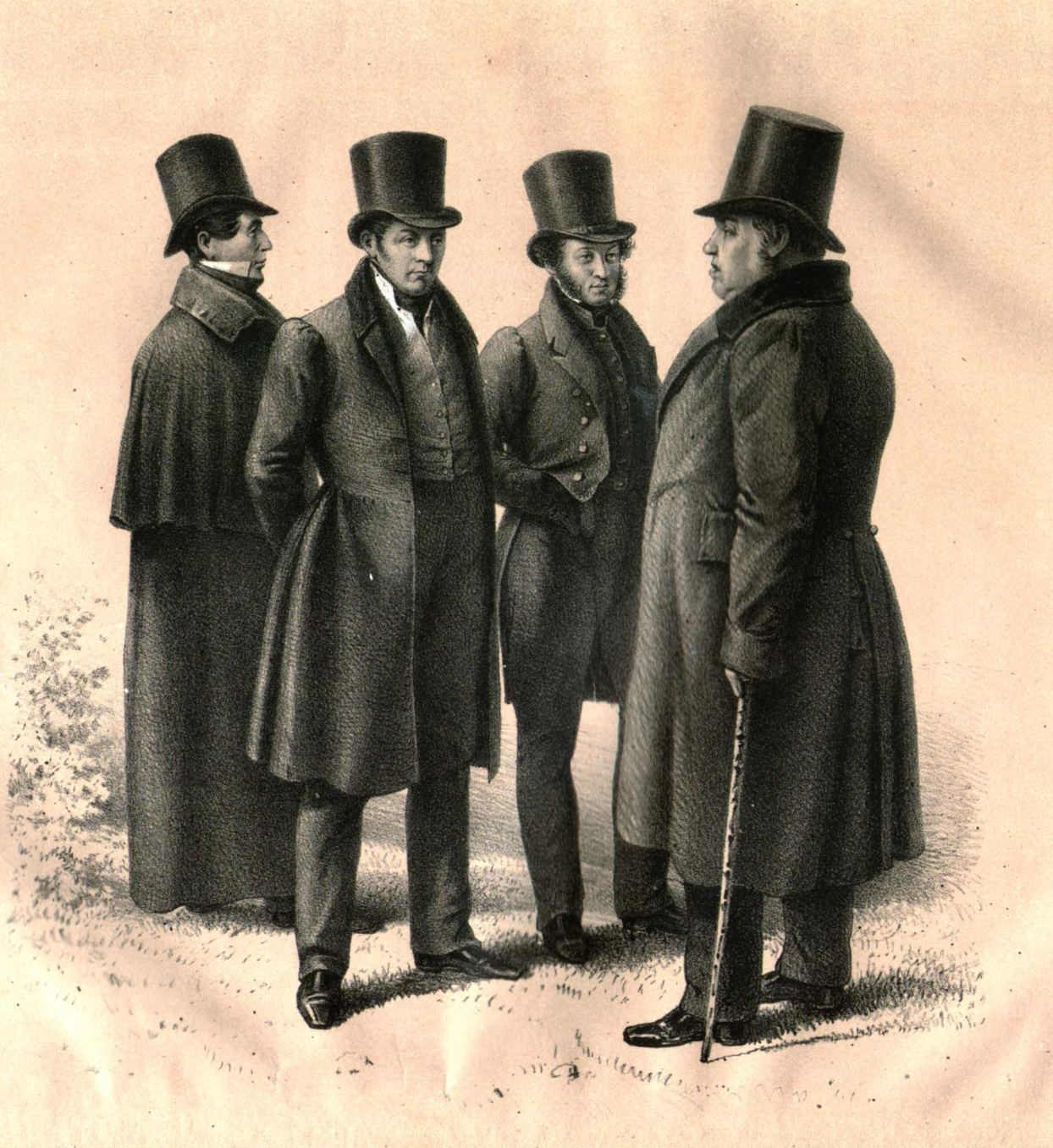 Н.И. Гнедич, В.А. Жуковский, А.С. Пушкин, И.А. Крылов. С картины академика Чернецова I, писанной с натуры в 1835 году.